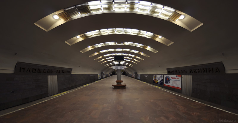 Платформа станции "Площадь Ленина"